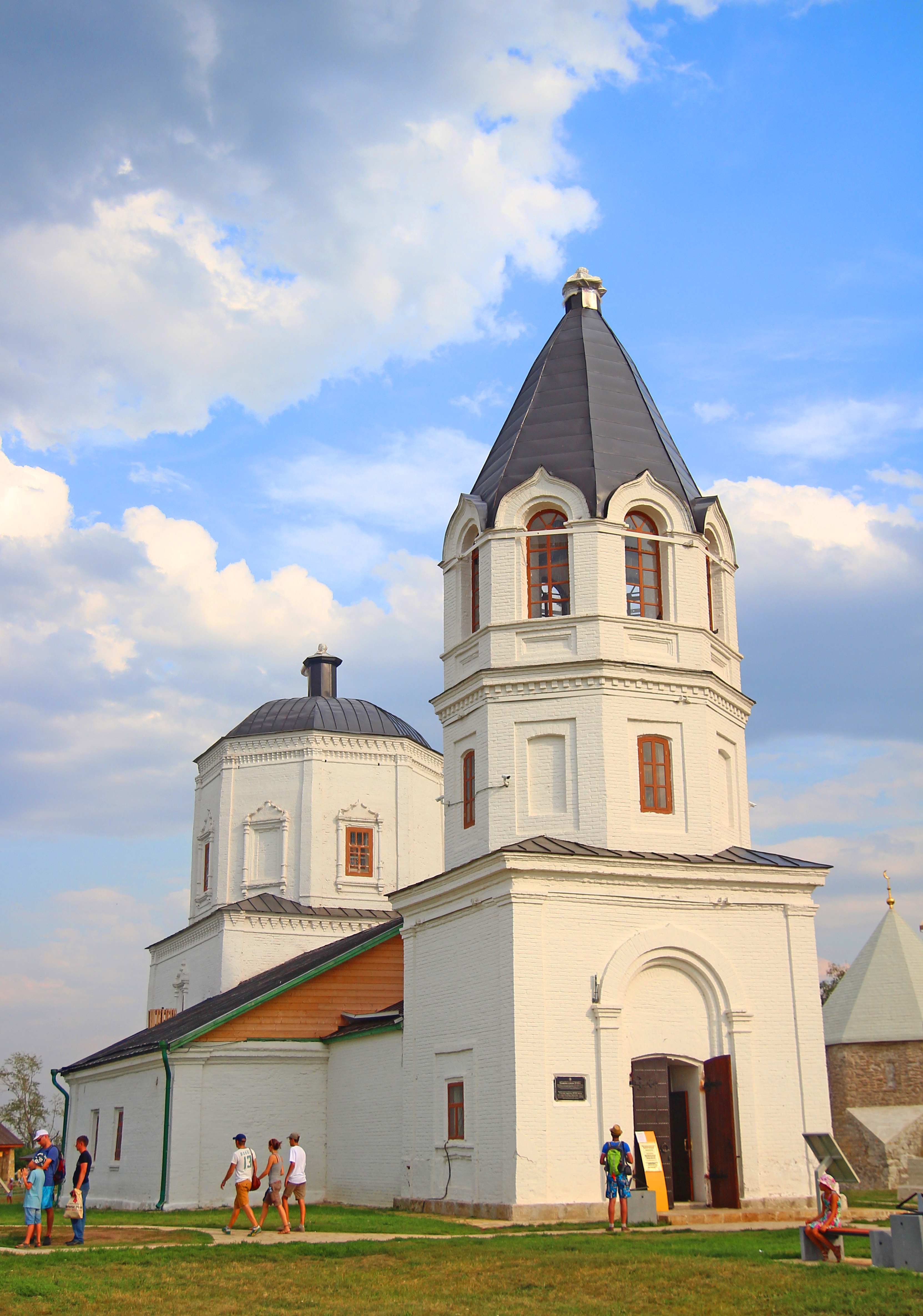 Церковь Успенская (Республика Татарстан, Болгар, 3 км от город Болгар, левый берег р. Волга)